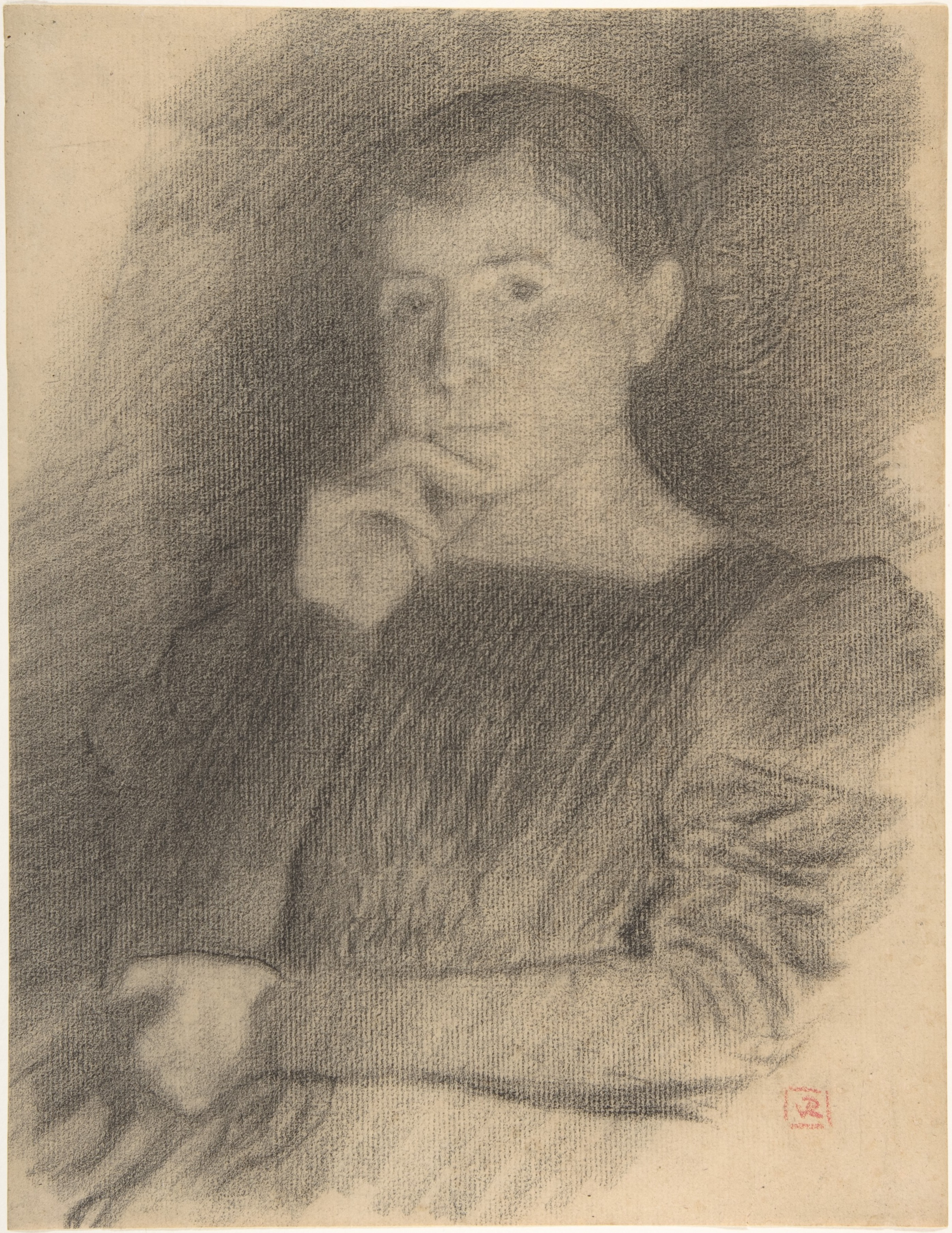 Drawing; Drawings